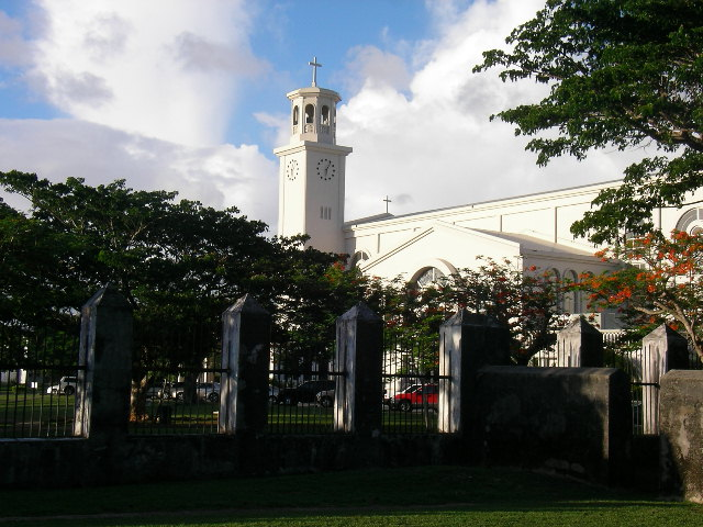 Plaza de España in Hagatña, Guam